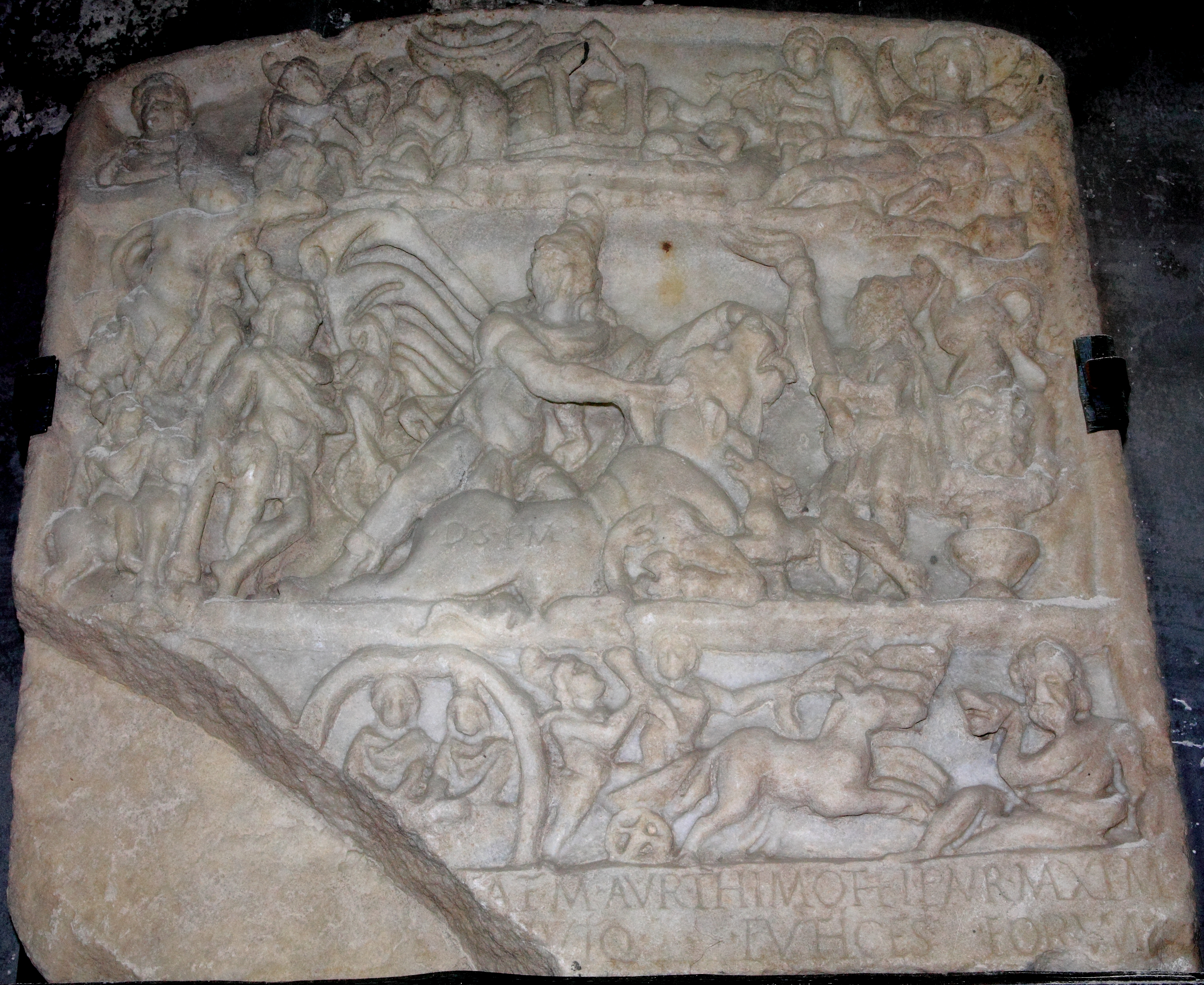 Mithra Museul din Sibiu